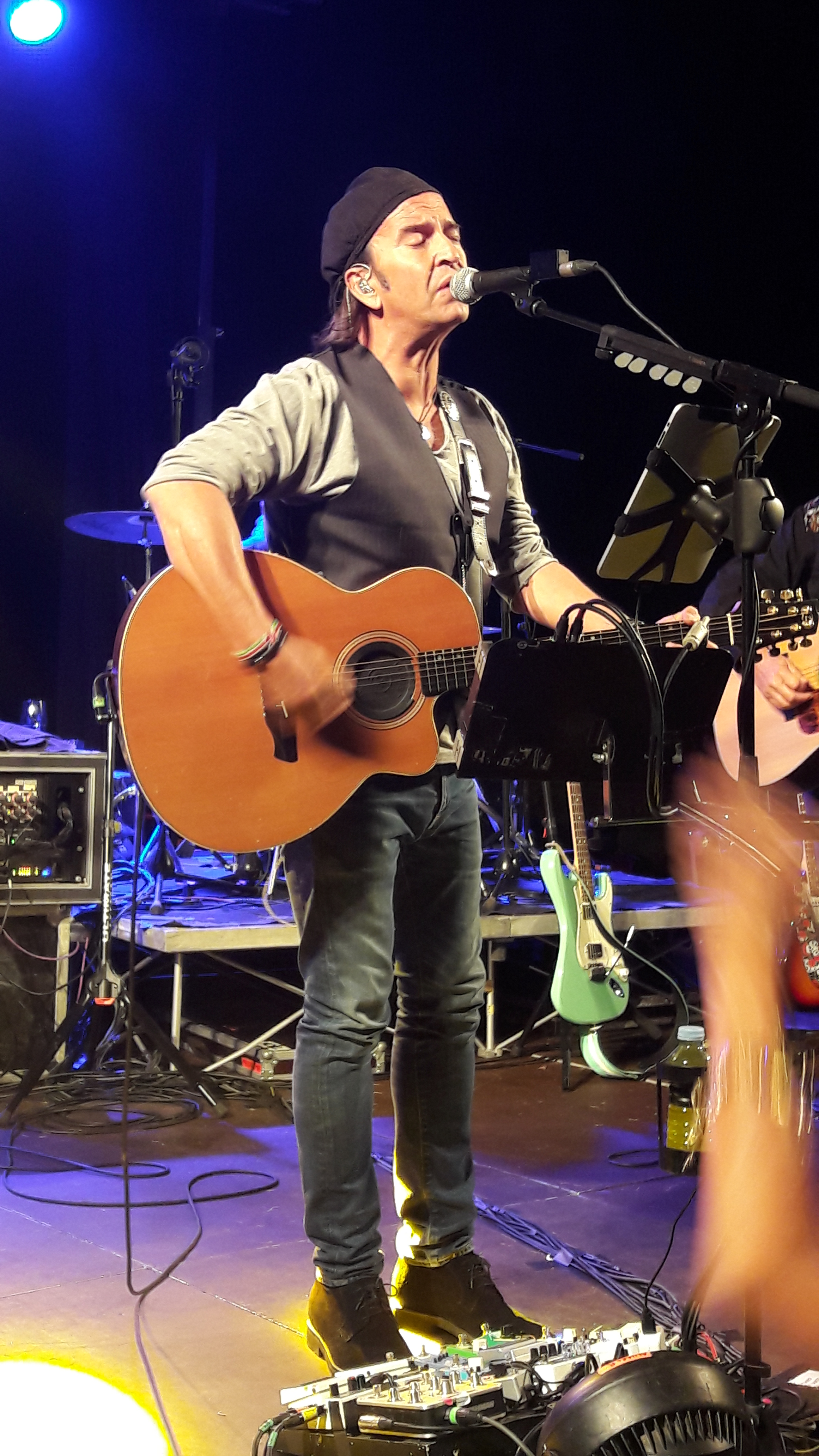 Álvaro Urquijo a un concert durant el 2016.